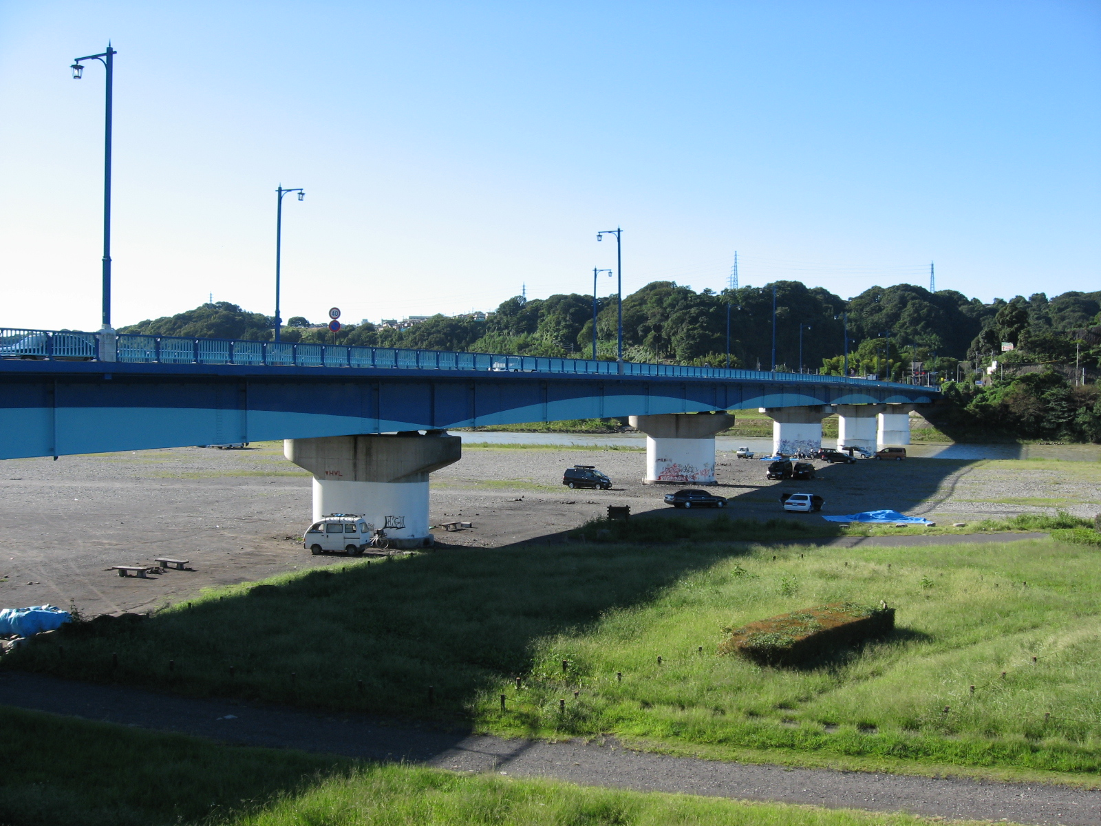 相模川に架かる高田橋